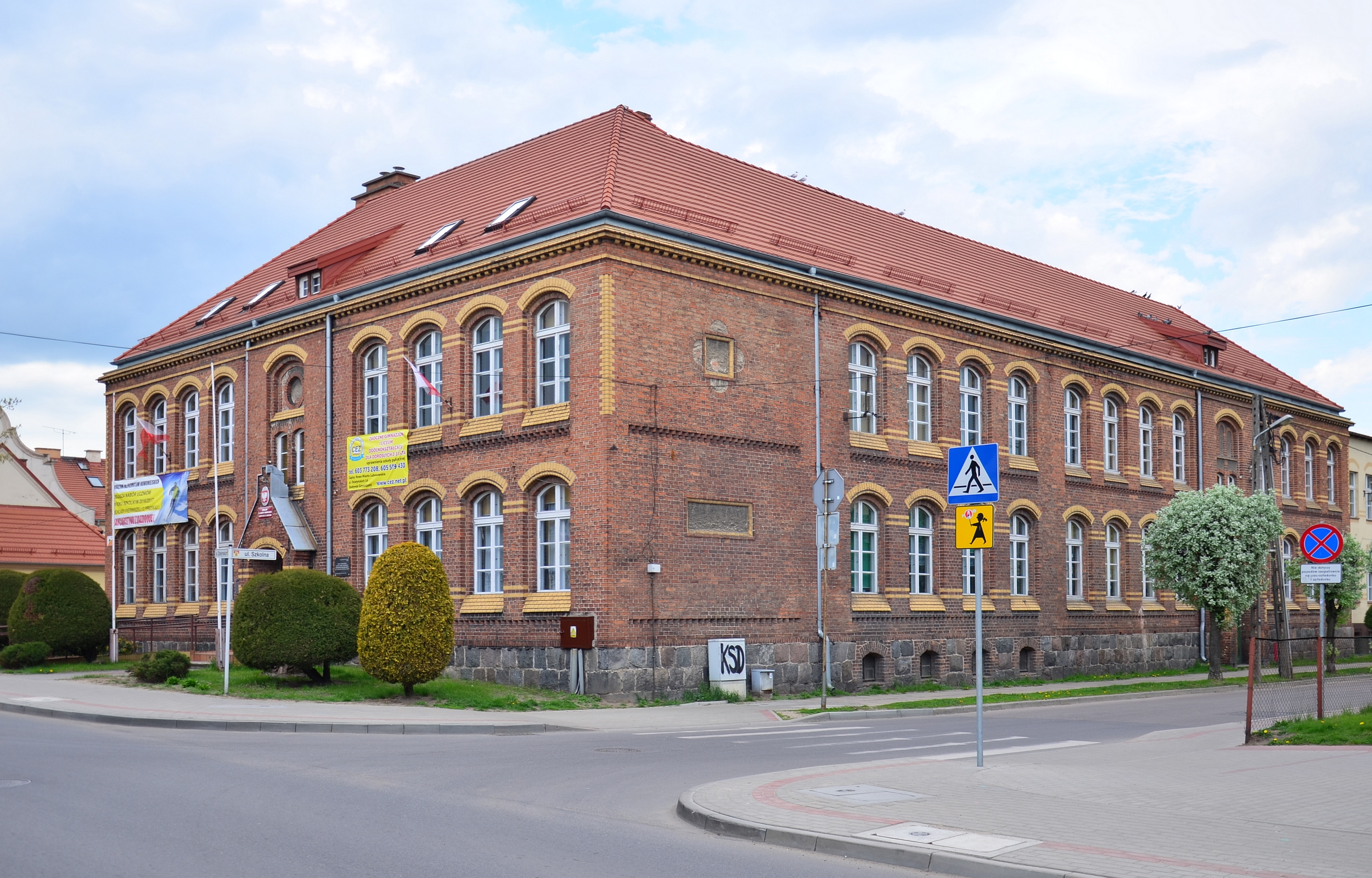 Gimnazjum im. Filomatów Nowomiejskich, 1897-1898